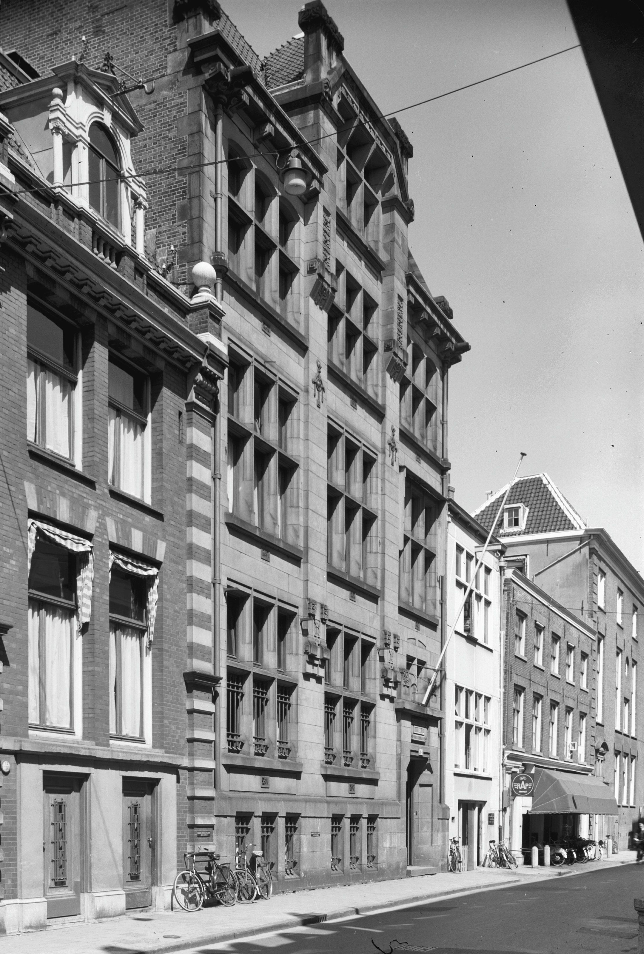 voorgevel